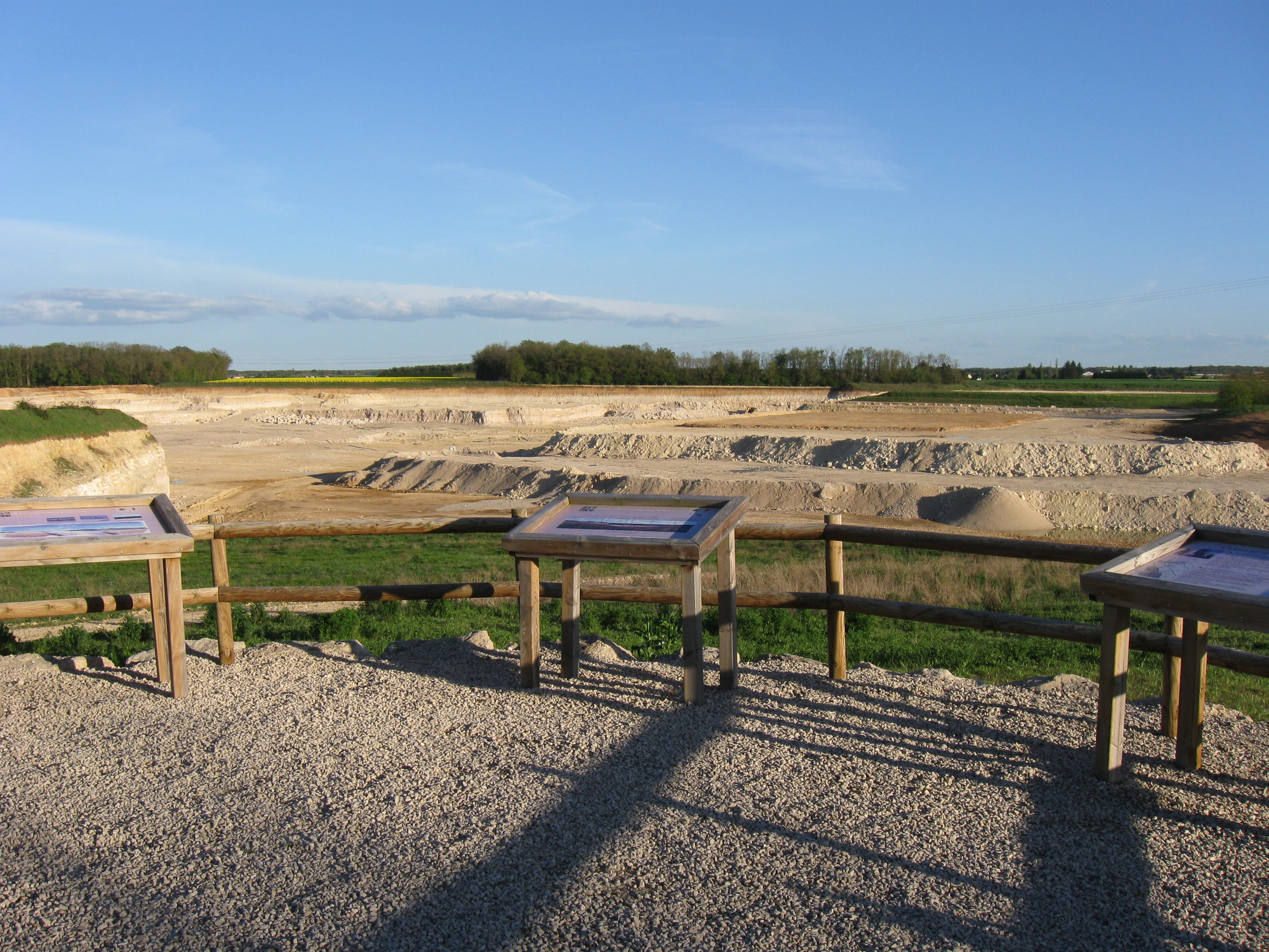 Carrière du Boulay (Souppes-sur-Loing, Seine-et-Marne, région Île-de-France).